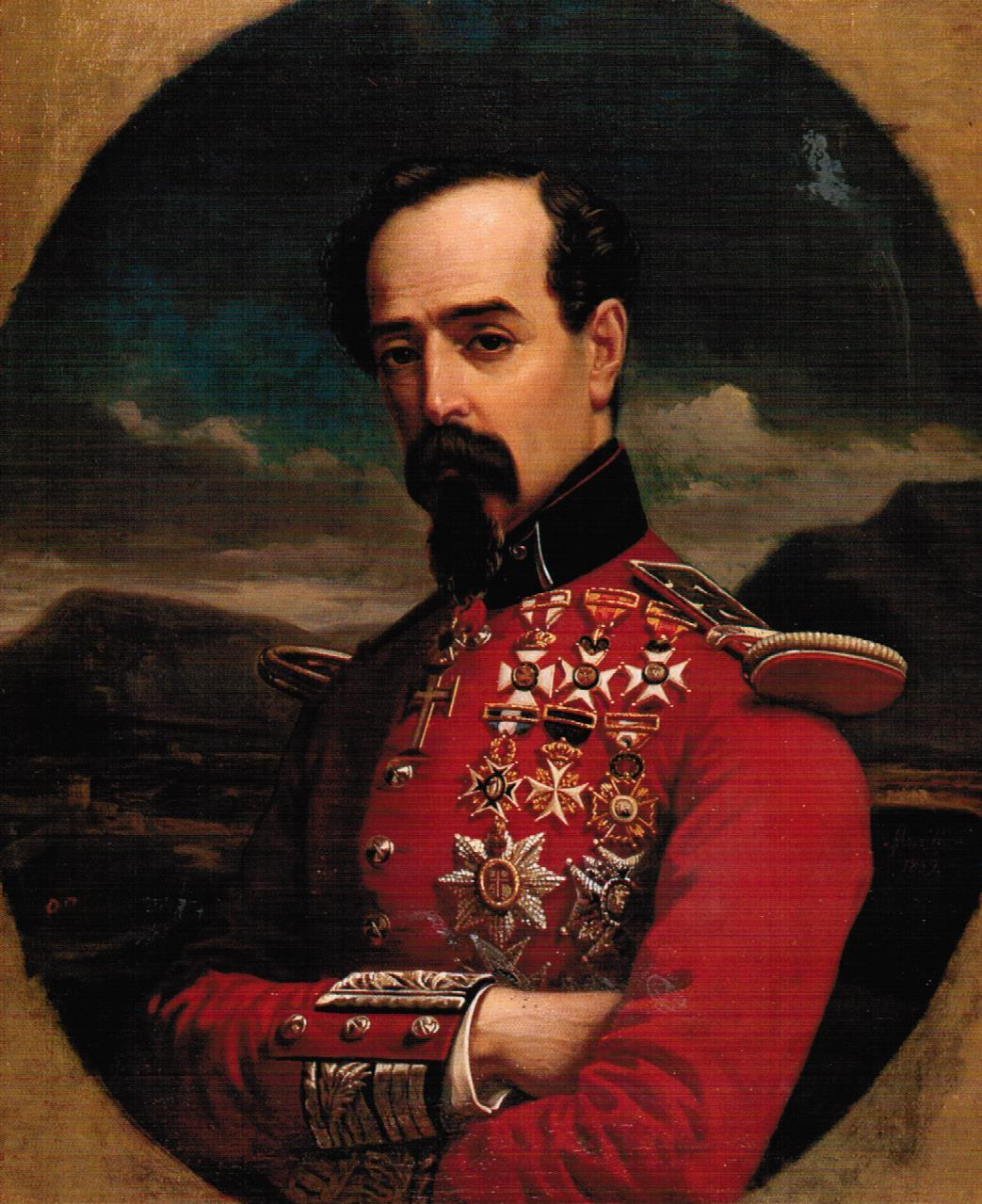 Retrato de Antonio de Orleans, duque de Montpensier e infante de España (1824-1890). Era hijo del rey Luis Felipe I de Francia y de María Amelia de Borbón-Dos Sicilias, y contrajo matrimonio con la infanta Luisa Fernanda de Borbón, hija del rey Fernando VII de España y hermana de la reina Isabel II, que concedió al duque de Montpensier el título de infante de España.